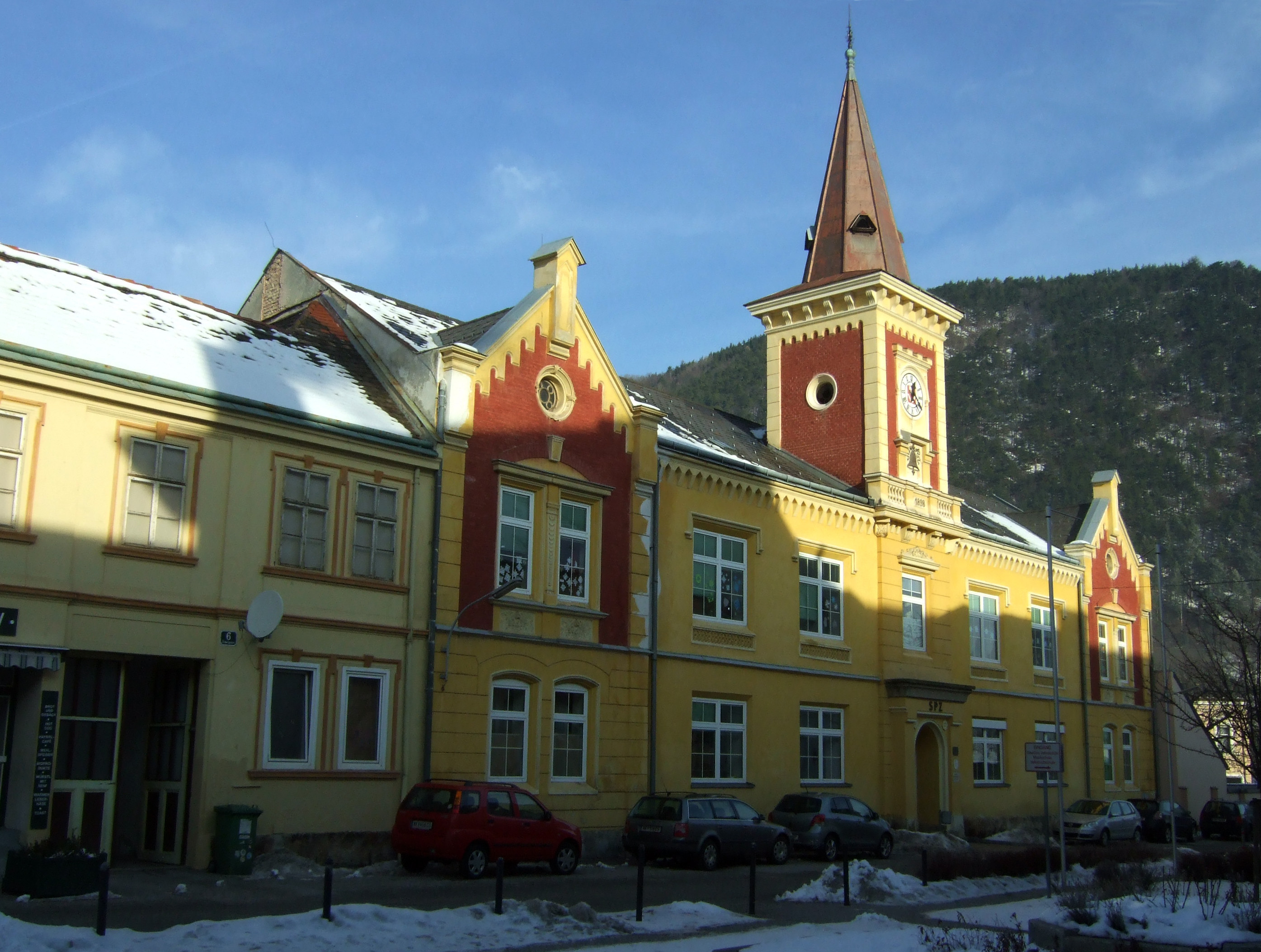 Schule, Altes Rathaus